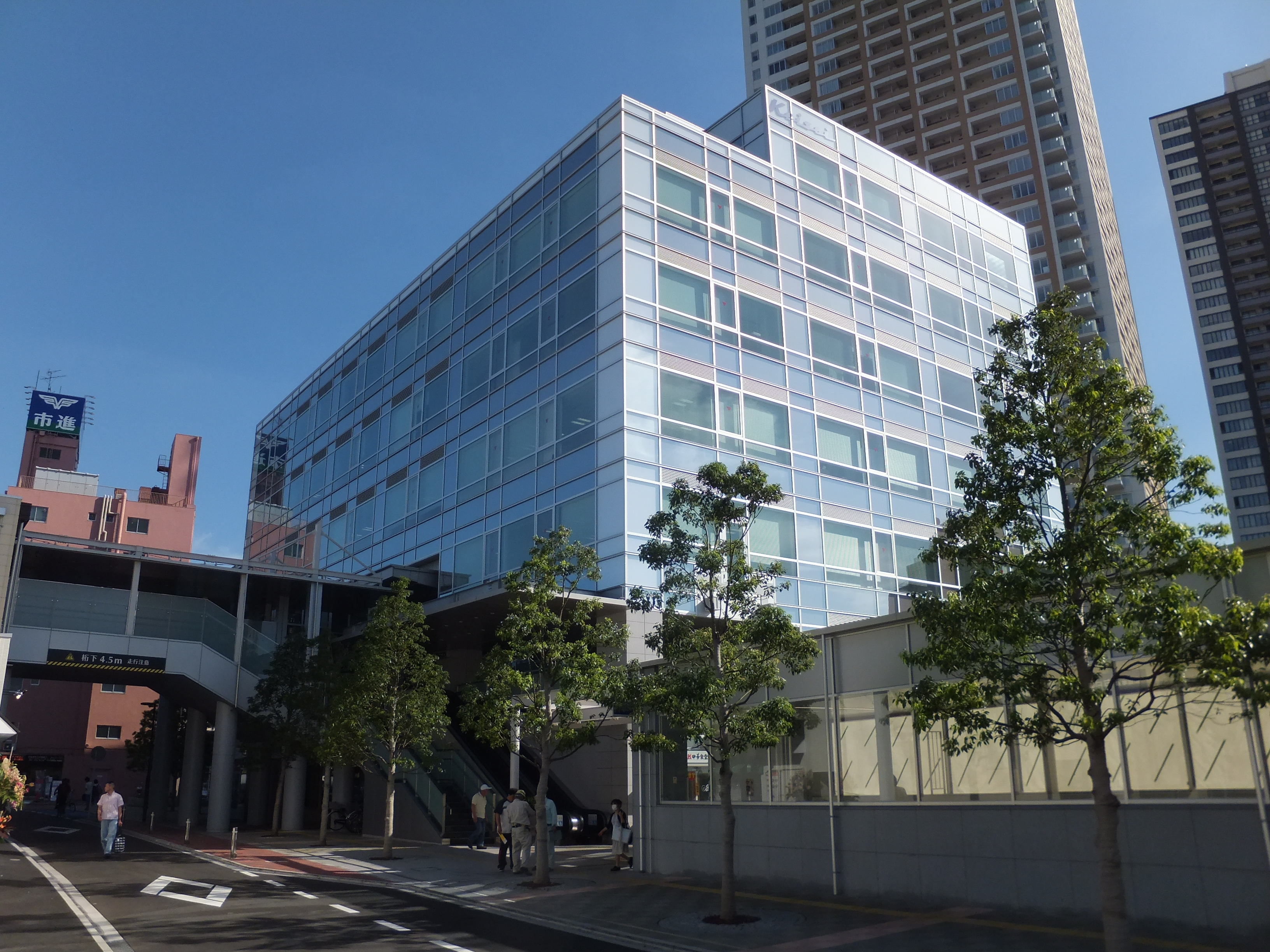 2013年9月17日から業務を開始した京成電鉄の新本社。京成八幡駅前（千葉県市川市）。京成八幡駅とは2階レベルでデッキで結ばれている。